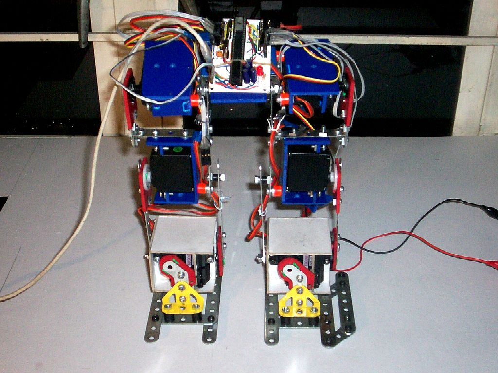 Robot Bipedo, construido por un estudiante de ingeniería en informática en la UPIICSA